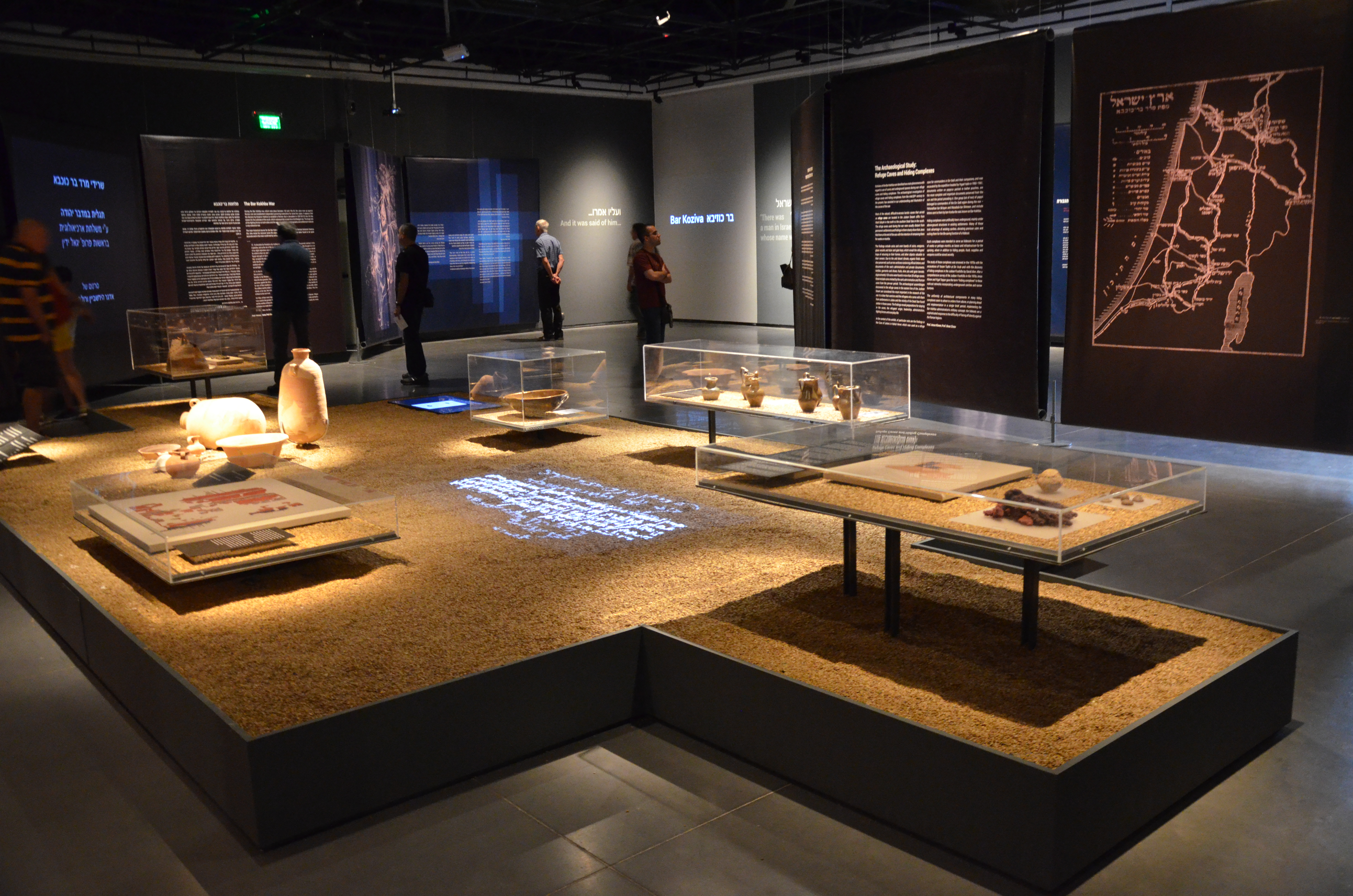 Bar Kokhba exhibition, Eretz Israel Museum